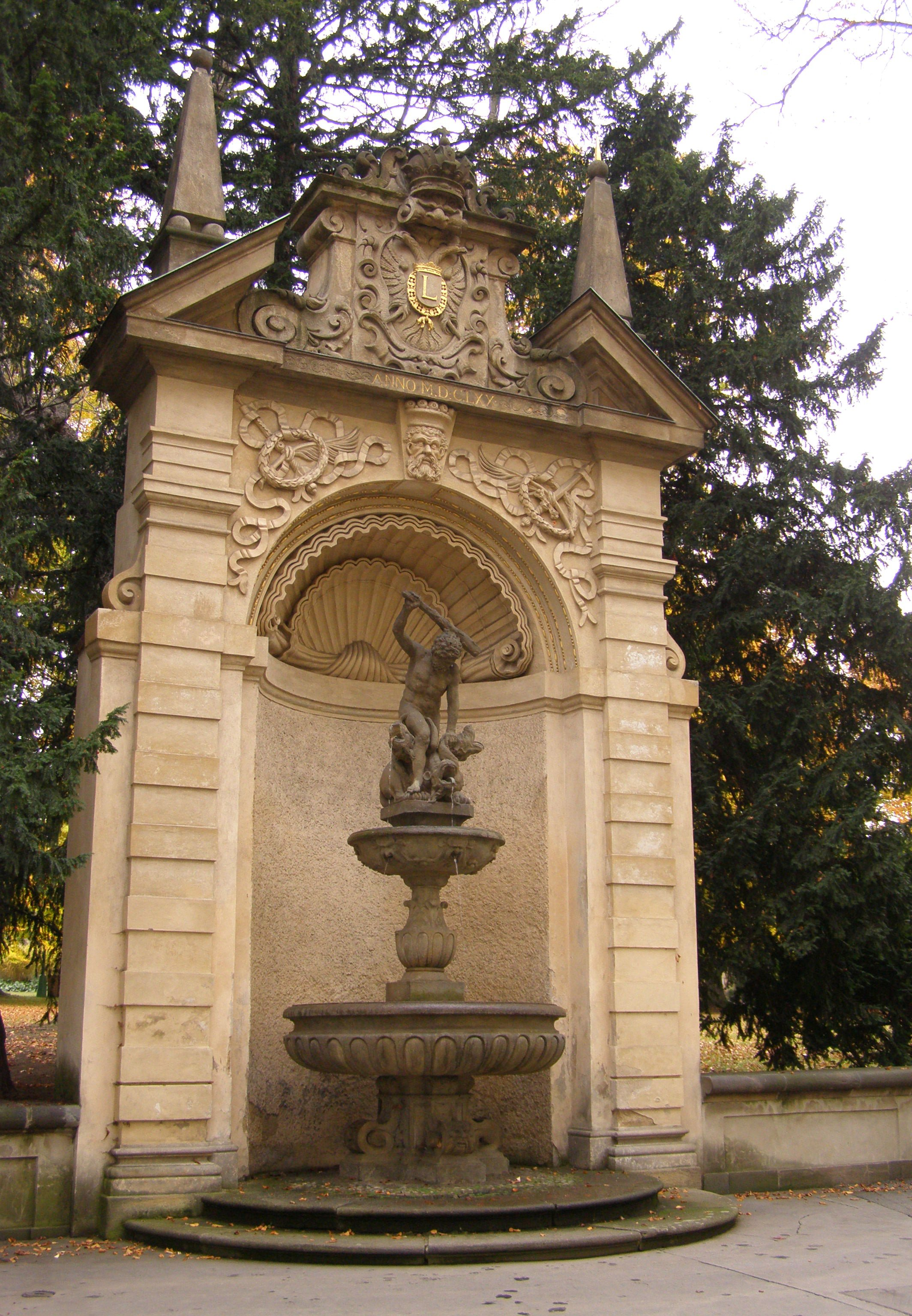 Pražský hrad, Královská zahrada, Herkulova kašna